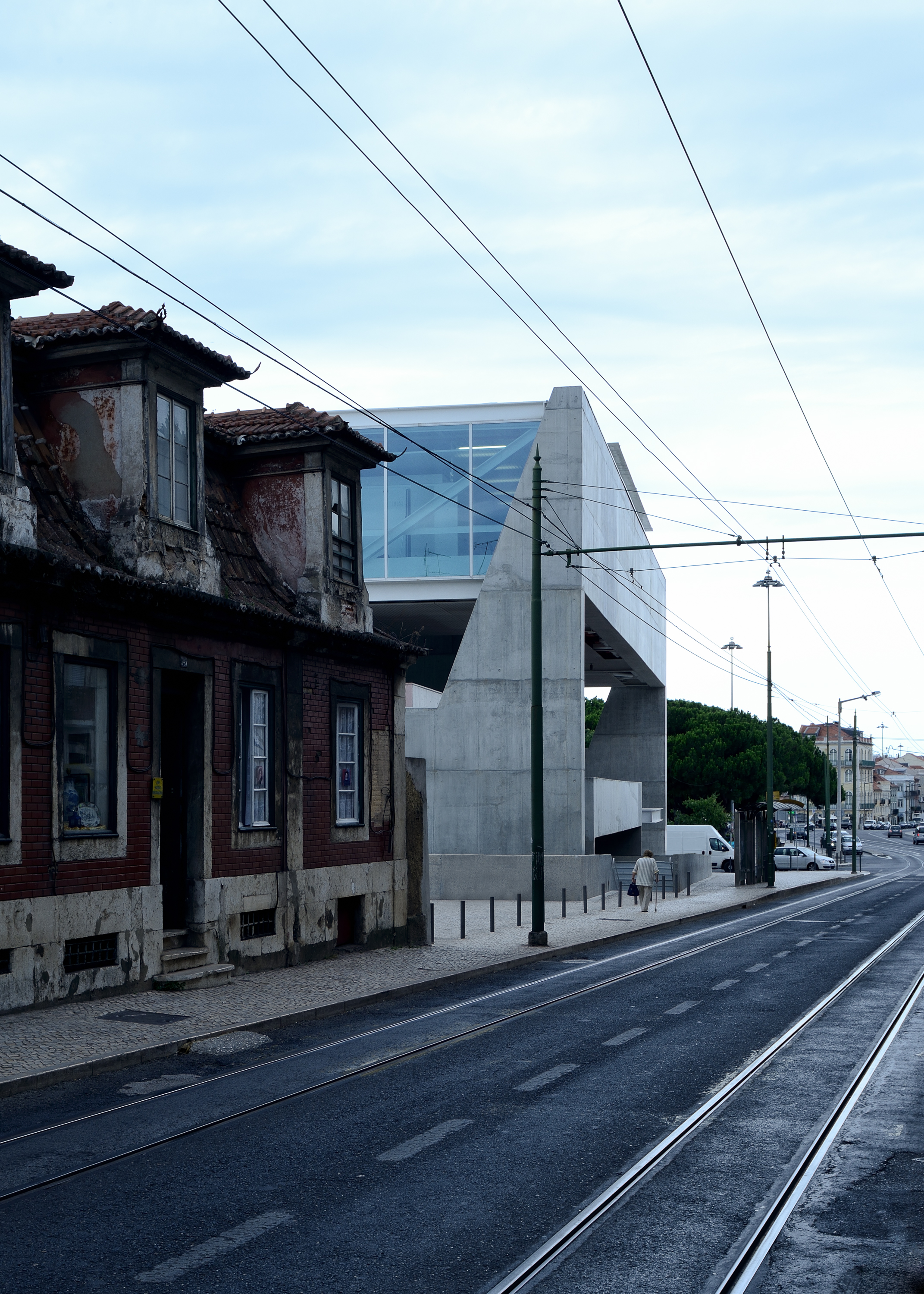 Paulo Mendes da Rocha, Museu Nacional dos Coches